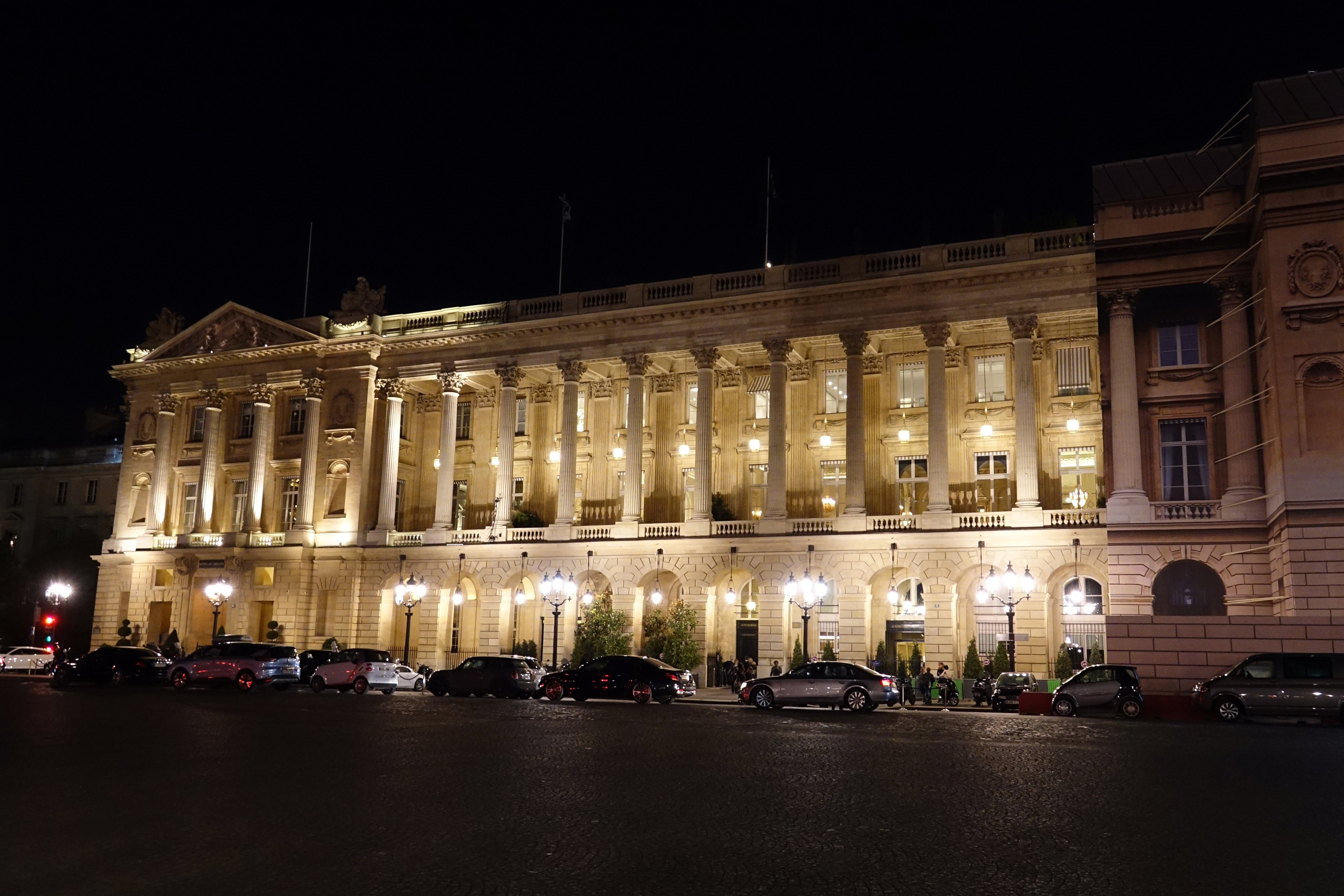 Grand Prix ACF de la Startup Automobile 2019